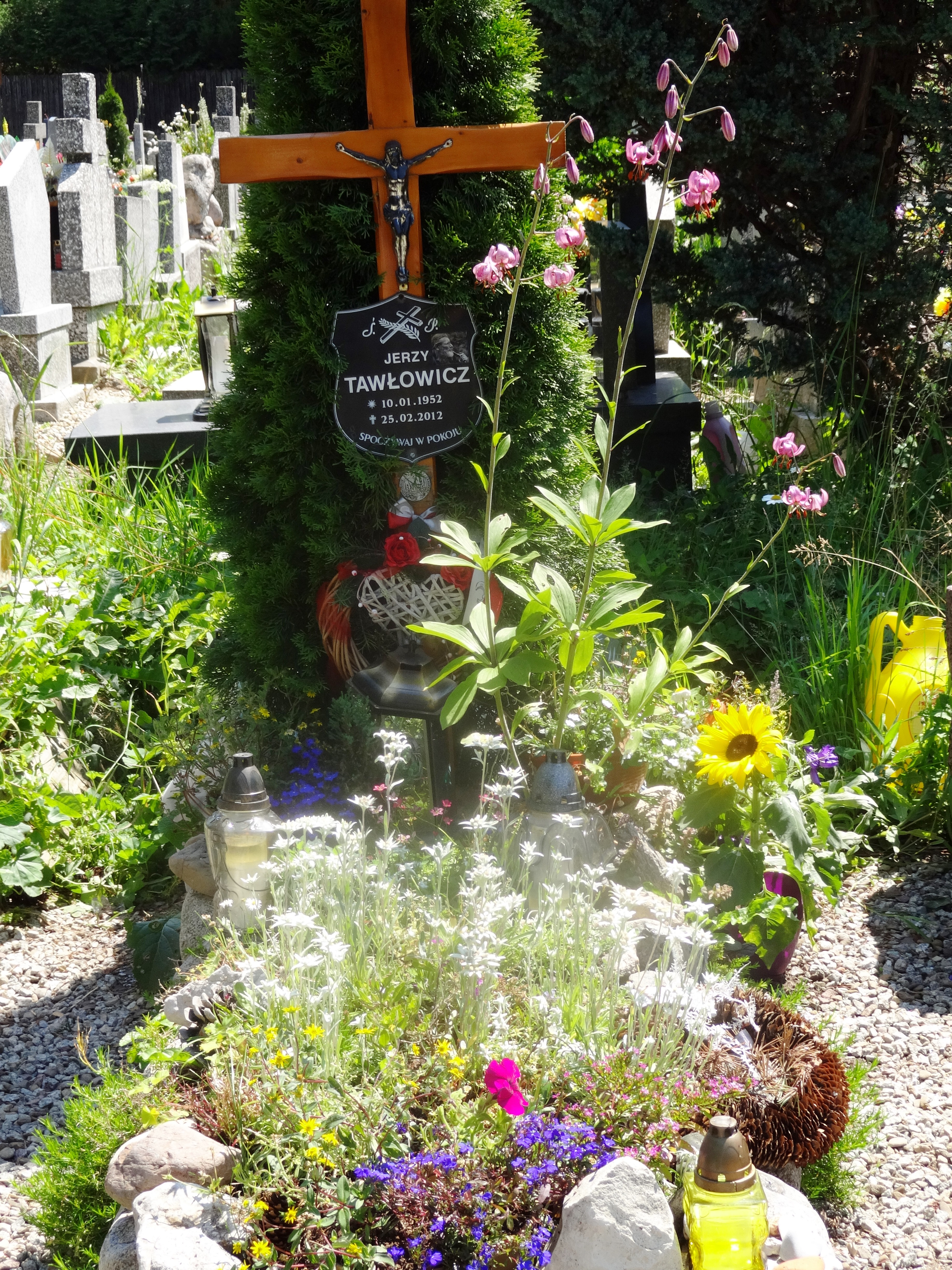 New Cemetery in Zakopane, Jerzy Tawłowicz.